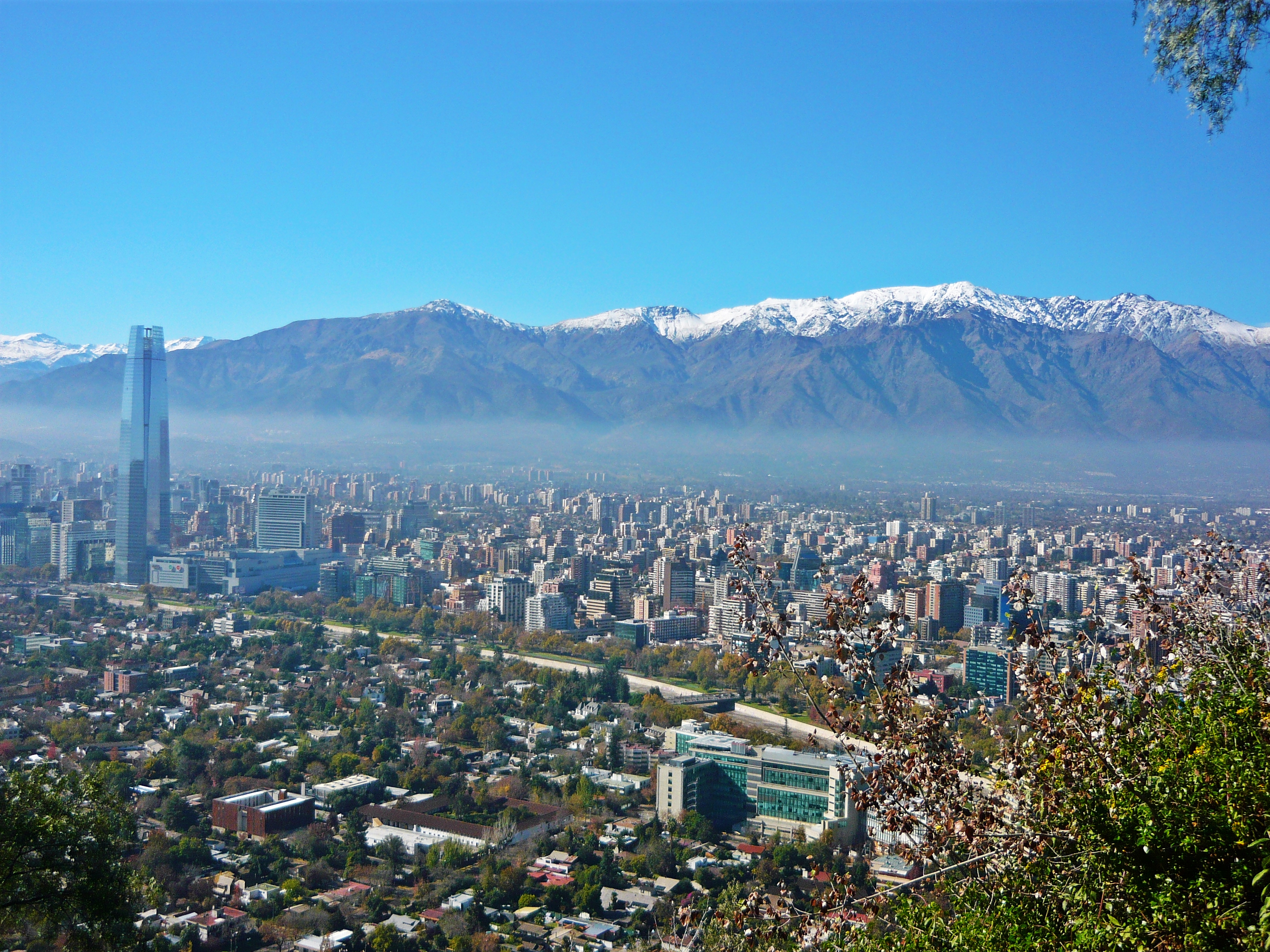 Santiago desde el Cerro San Cristóbal